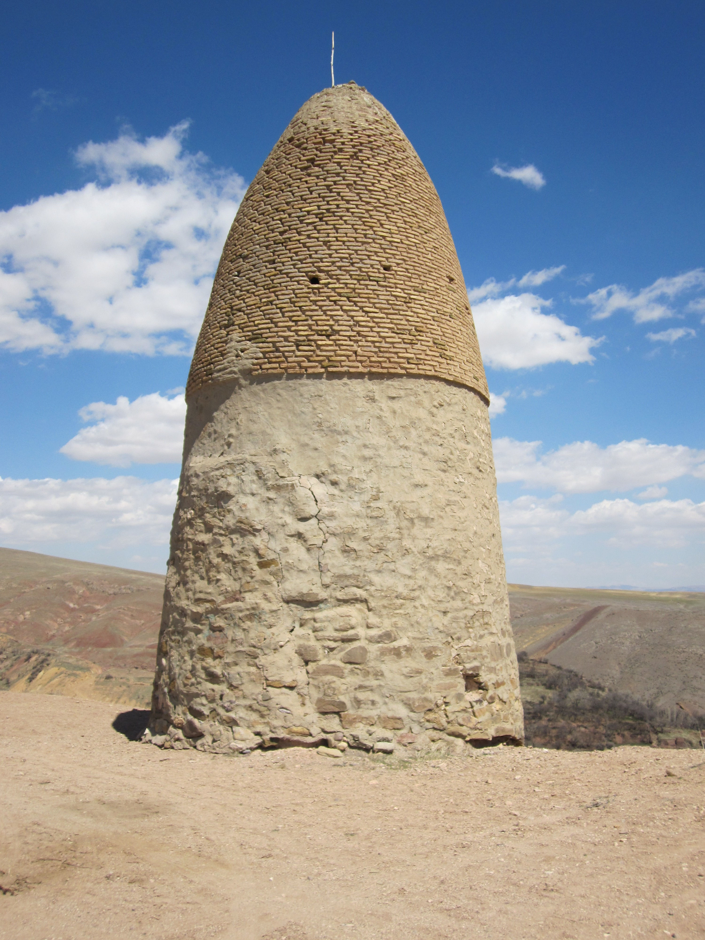 عکس از میل خوئین گرفته شده در تاریخ 10 فروردین 1390